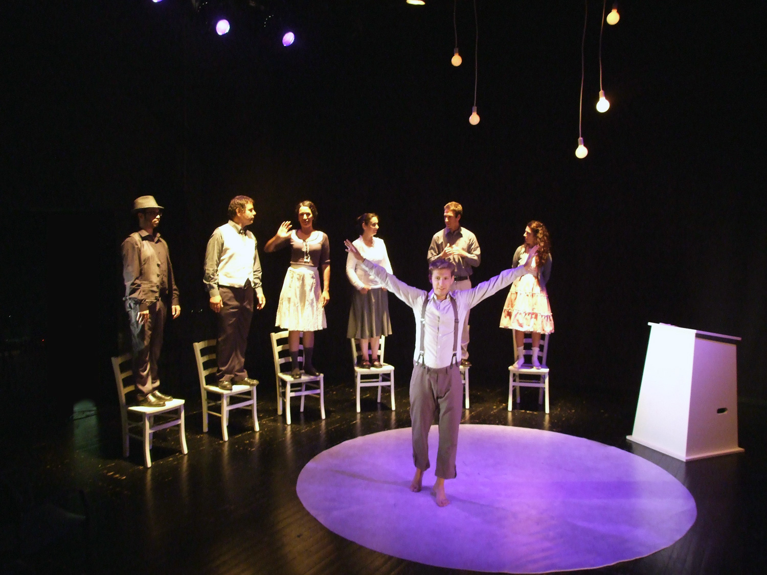 7 עדות (דוממים) 2010 (בתמונה מימין לשמאל - אביה ברוש, בועז בראל, לובה רעים,מיה מורסיאנו, חנוך רעים, יאיר סרי, מקדימה אסף שצברג)